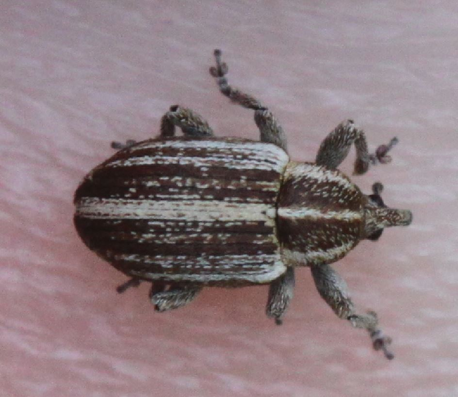 Rüsselkäfer Tychius parallelus am 16. April 2019 an Besenginster in der Schwetzinger Hardt